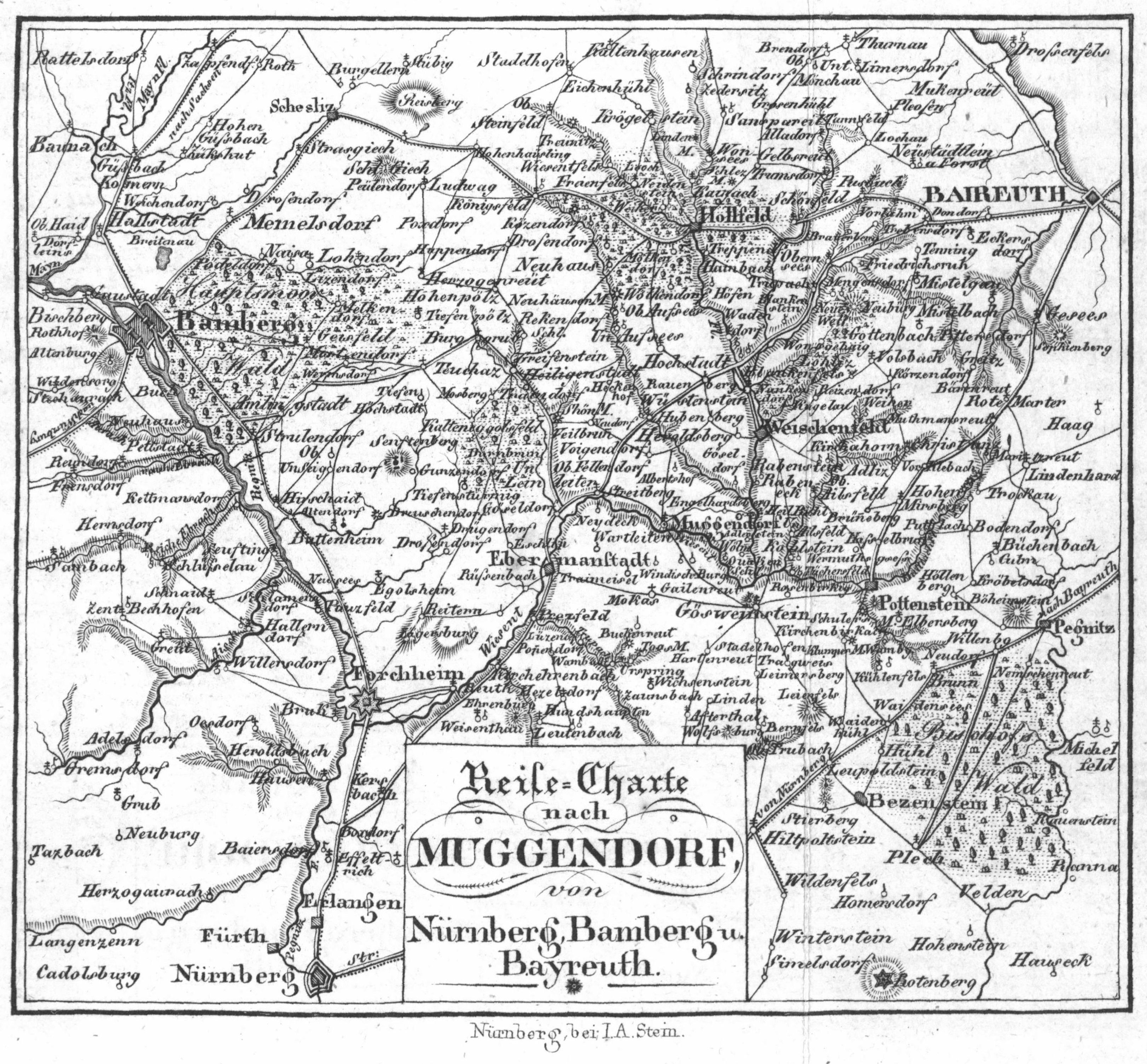 Reise=Charte nach Muggendorf von Nürnberg, Bamberg u. Bayreuth.